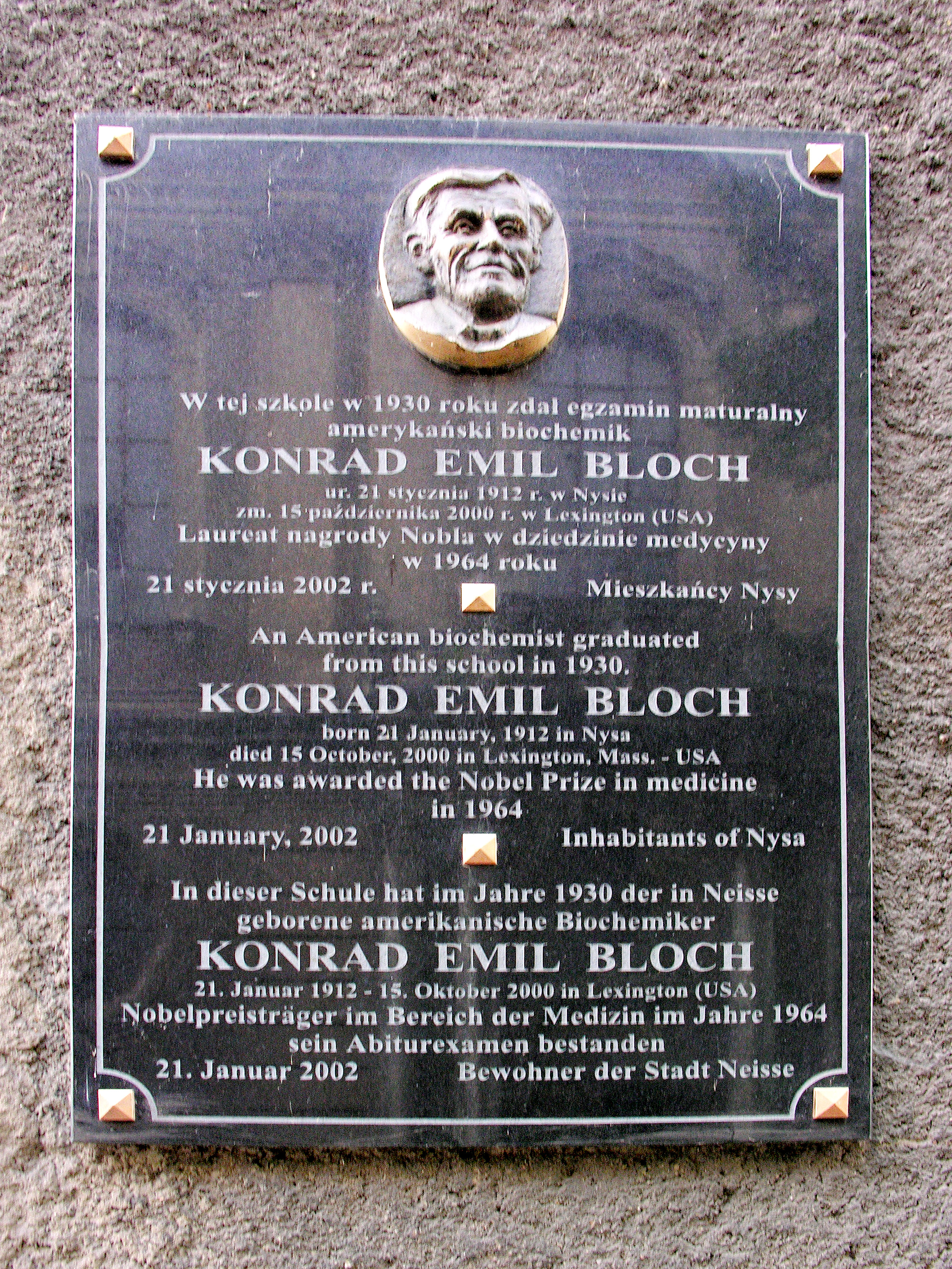 Tablica ku czci Konrada Blocha w Nysie